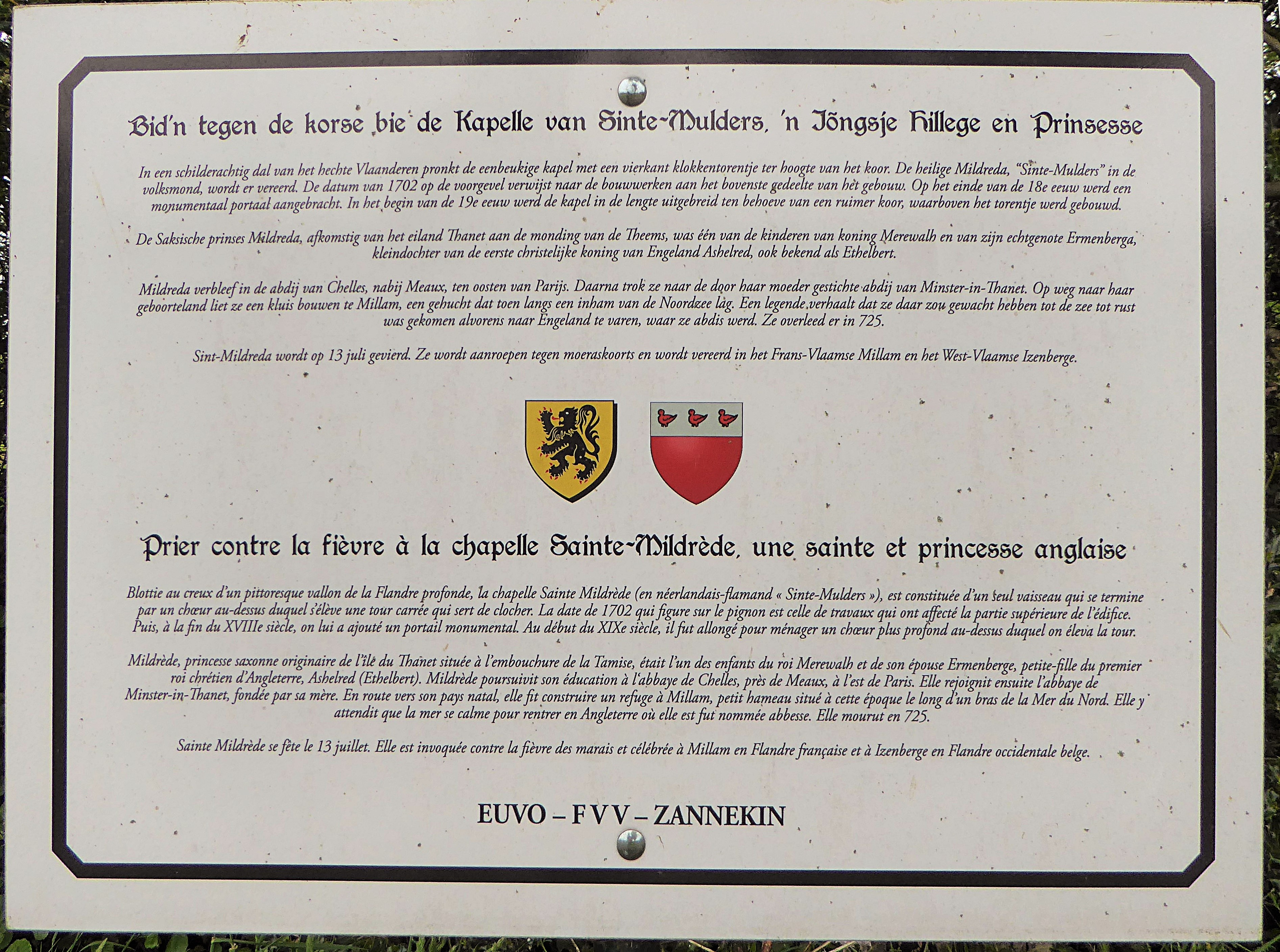 Panneau relatif à la vie de ste-Mildred Millam Nord Hauts-de-France.